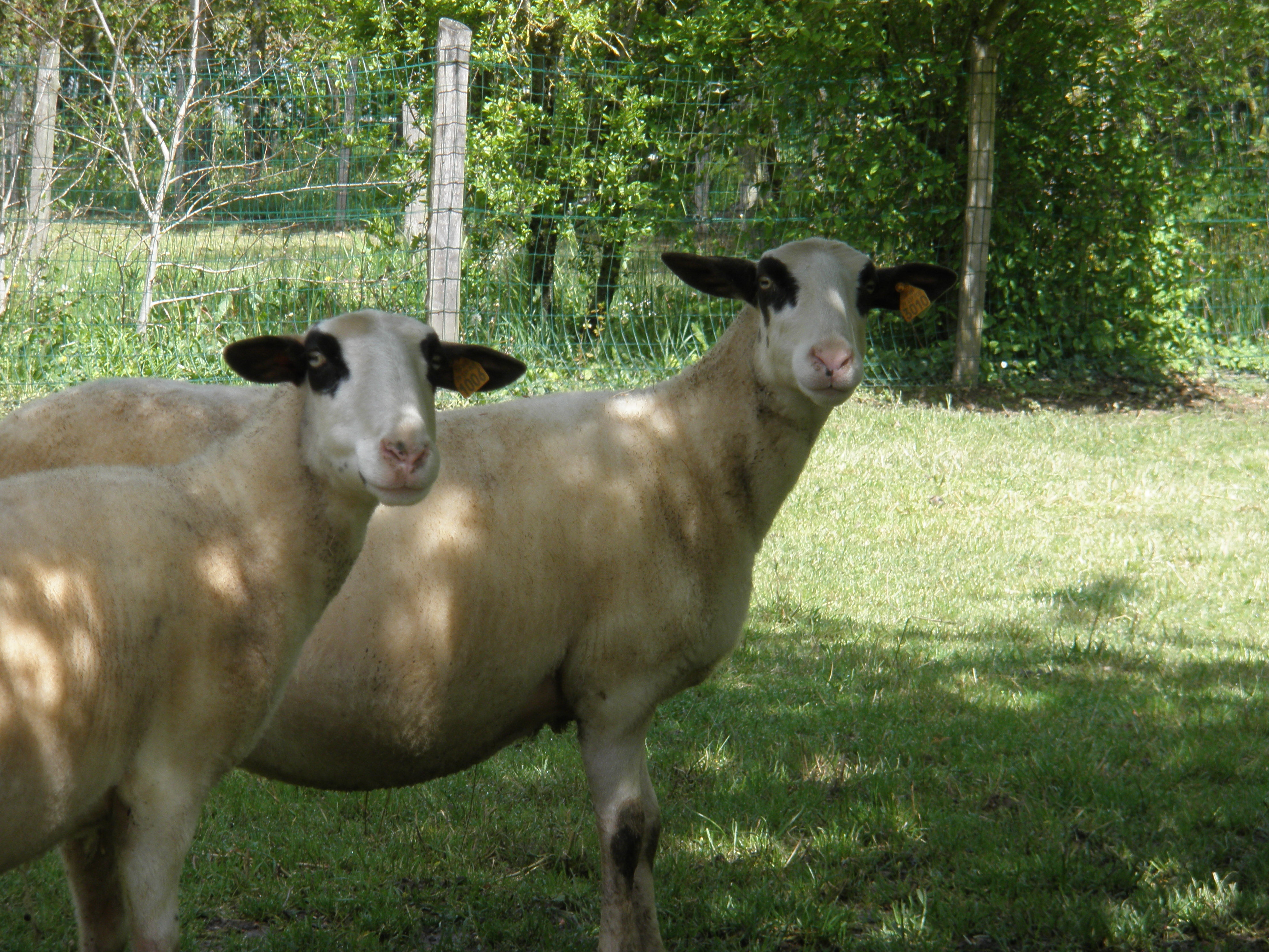 Moutons "causse du lot" à Vasles (79) en mai 2012